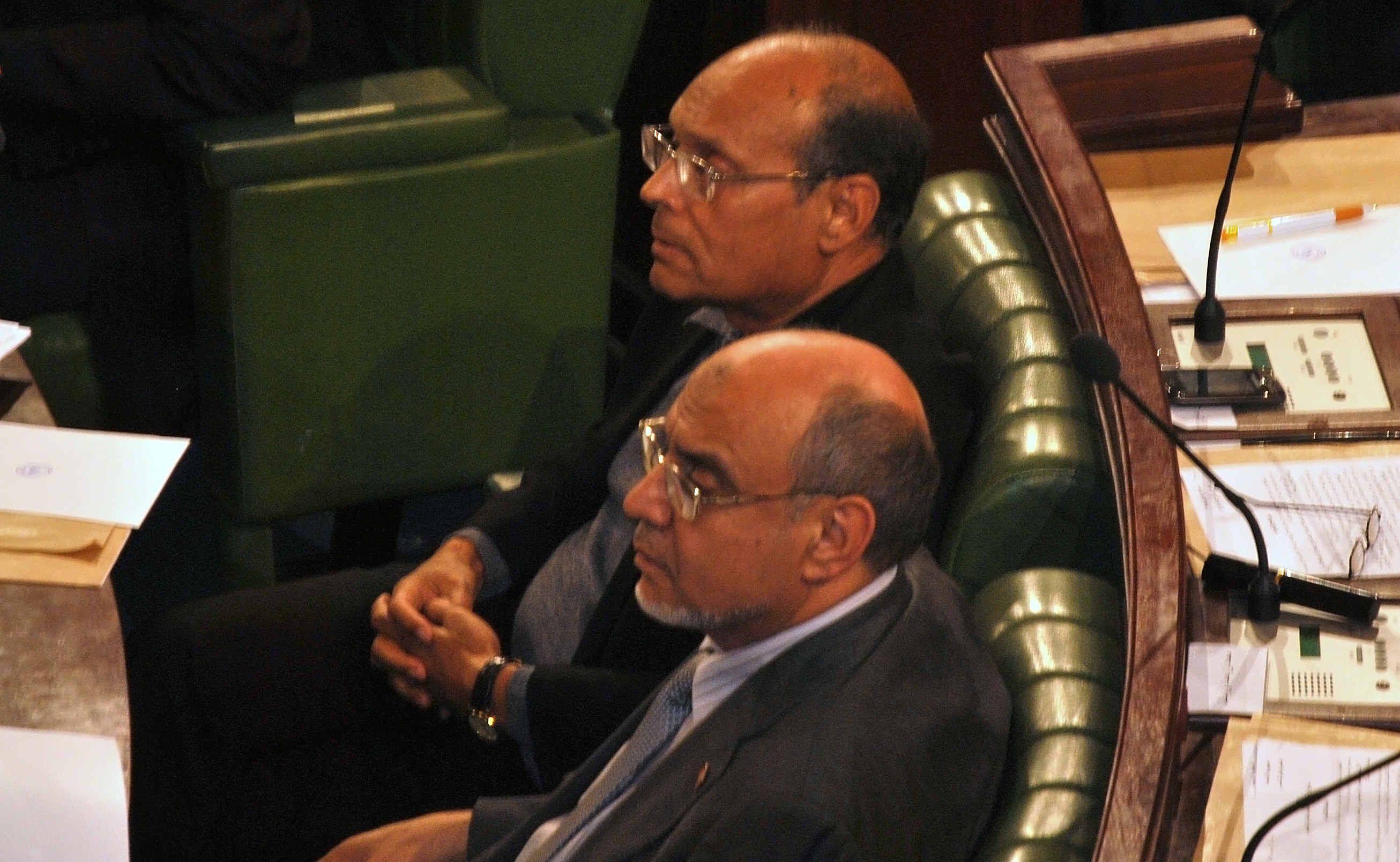 Le président provisoire de la république tunisienne Moncef Marzouki et le premier ministre Hamadi Jebali assis côte à côte à l'assemblée nationale constituante lors de la séance inaugurale.